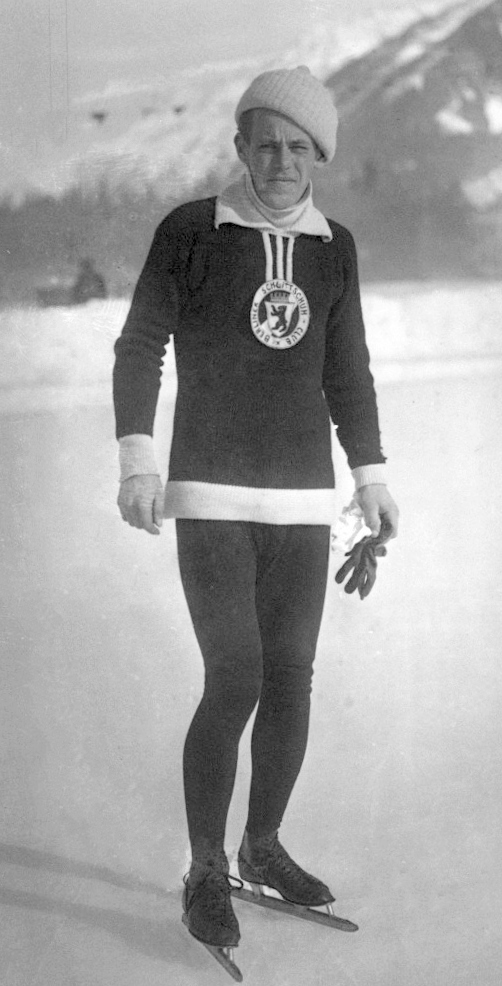 24-1-14, Chamonix, Molander , finlandais [portrait du patineur] : [photographie de presse] / [Agence Rol]